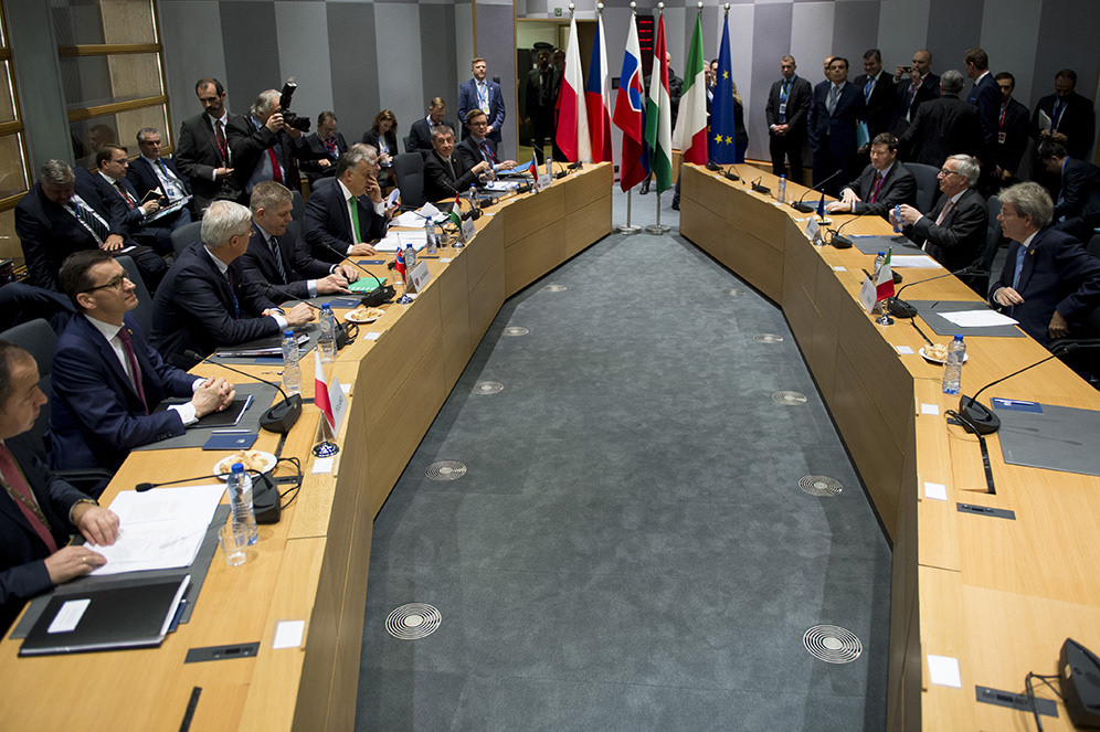 2017.12.14 Bruksela | Premier Mateusz Morawiecki uczestniczył w spotkaniach Grupy Wyszehradzkiej przed posiedzeniem Rady Europejskiej. Fot. P. Tracz / KPRM